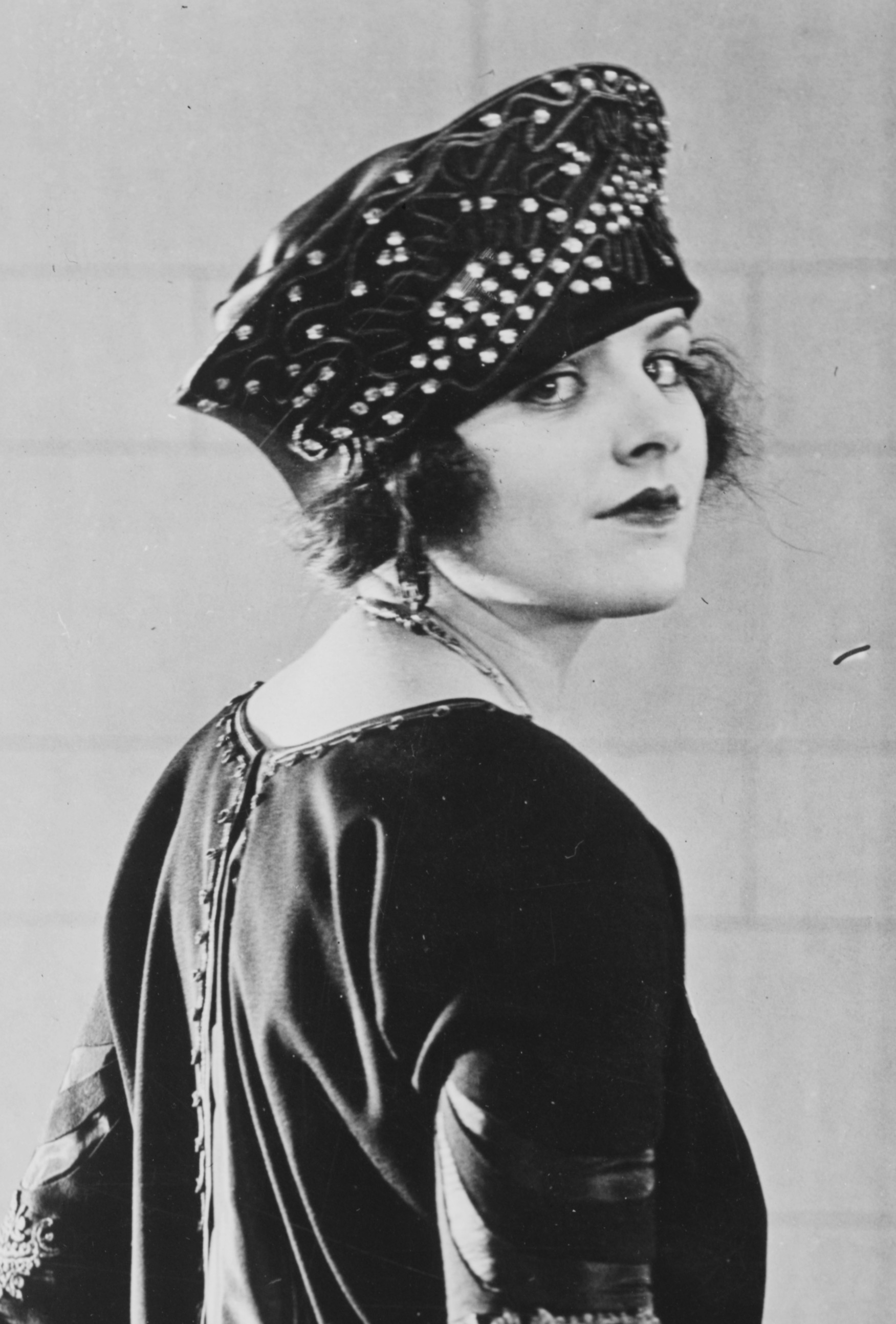 Actor Elaine Hammerstein